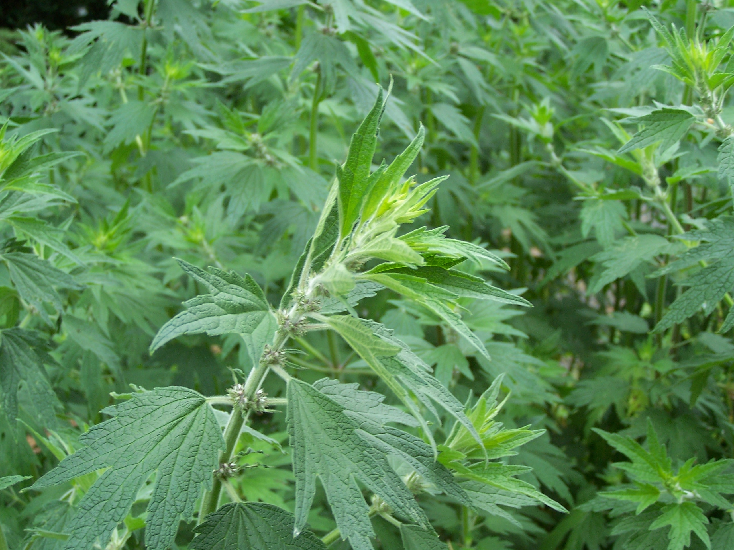 Leonurus cardiaca 17 juin 2006 Vieux jardin botanique de Göttingen